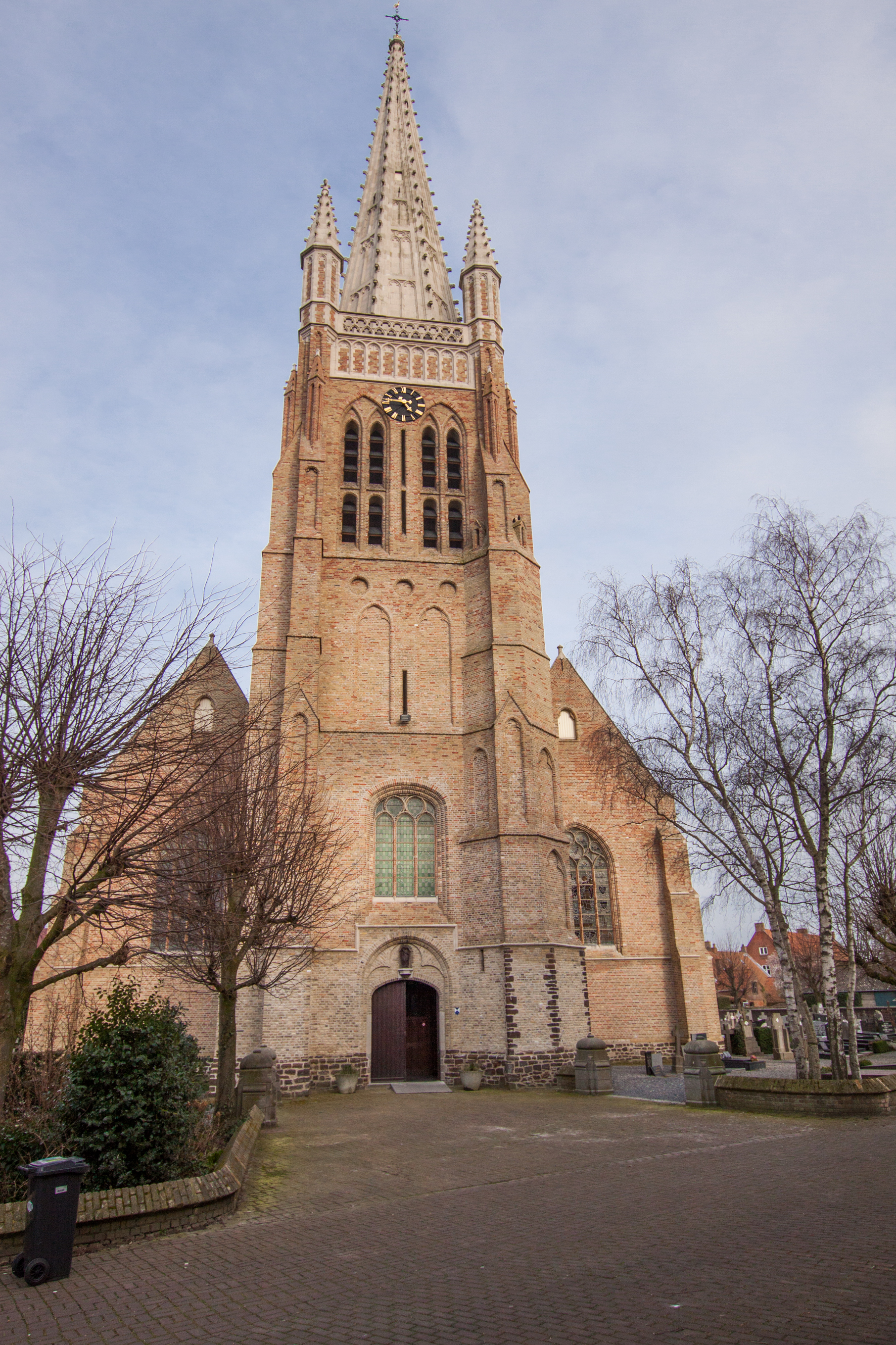 Boezinge Churchyard